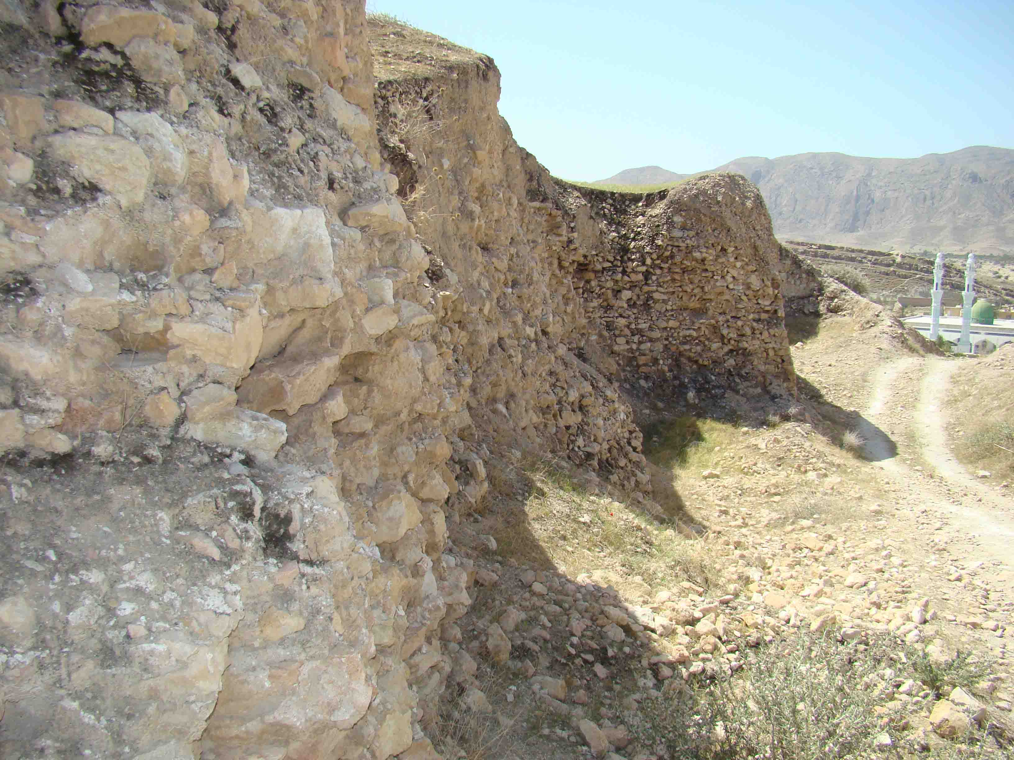 قلعه شاه نشين